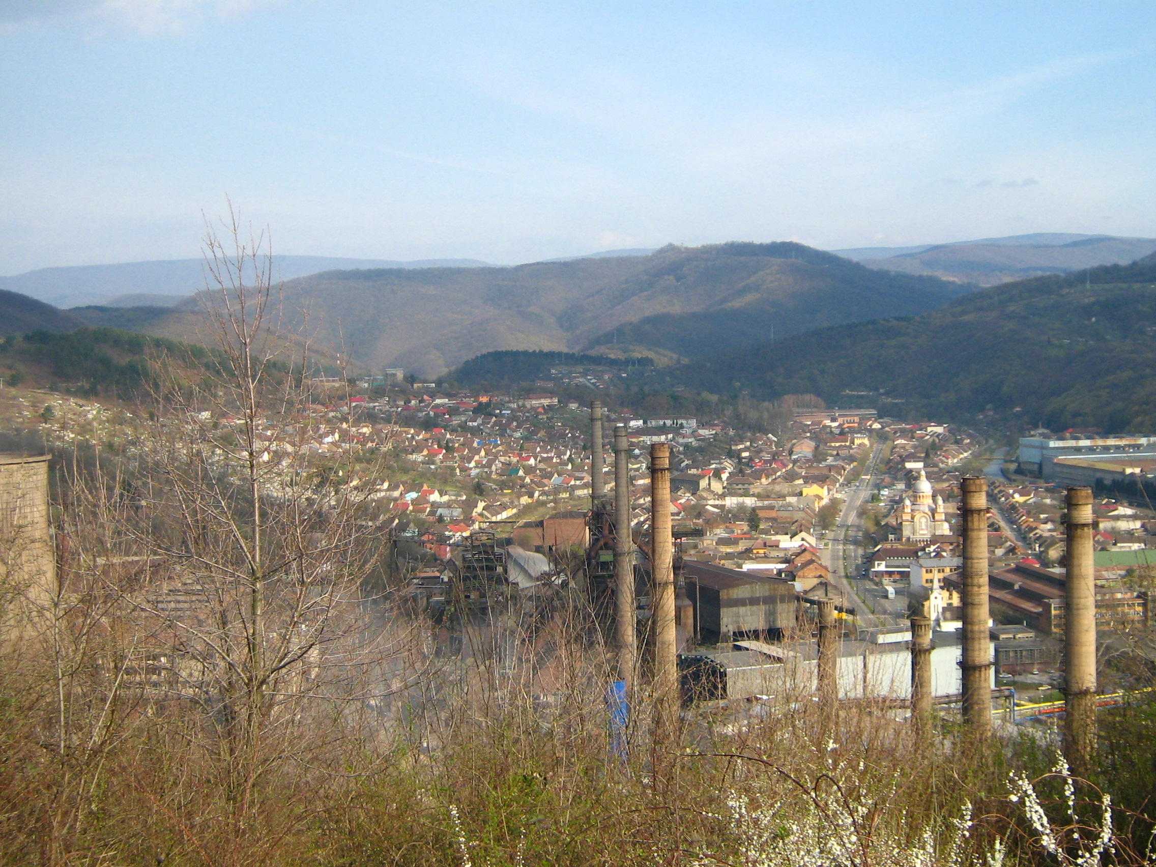 O fotografie a cartierului Muncitoresc, sau Reşiţa Veche